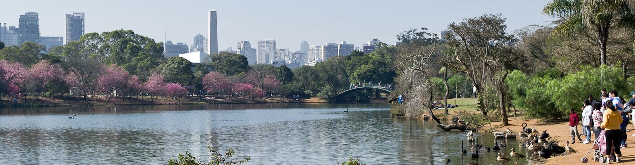 Panorama do Parque Ibirapuera, São Paulo, Brasil.